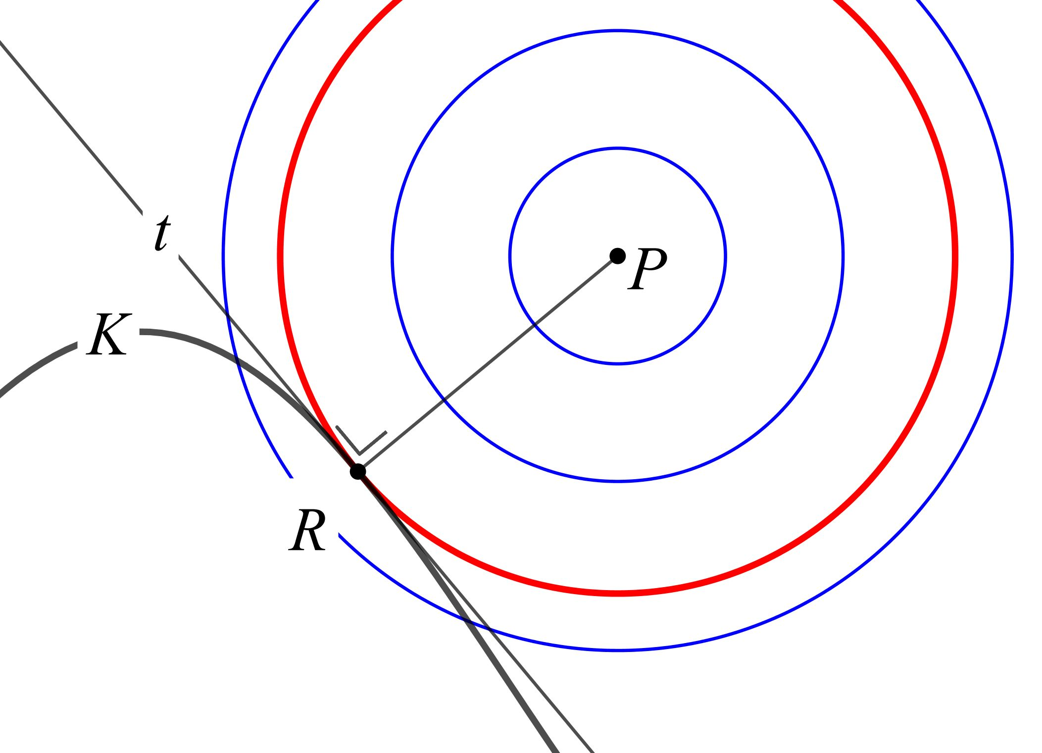 Huygenscirkels